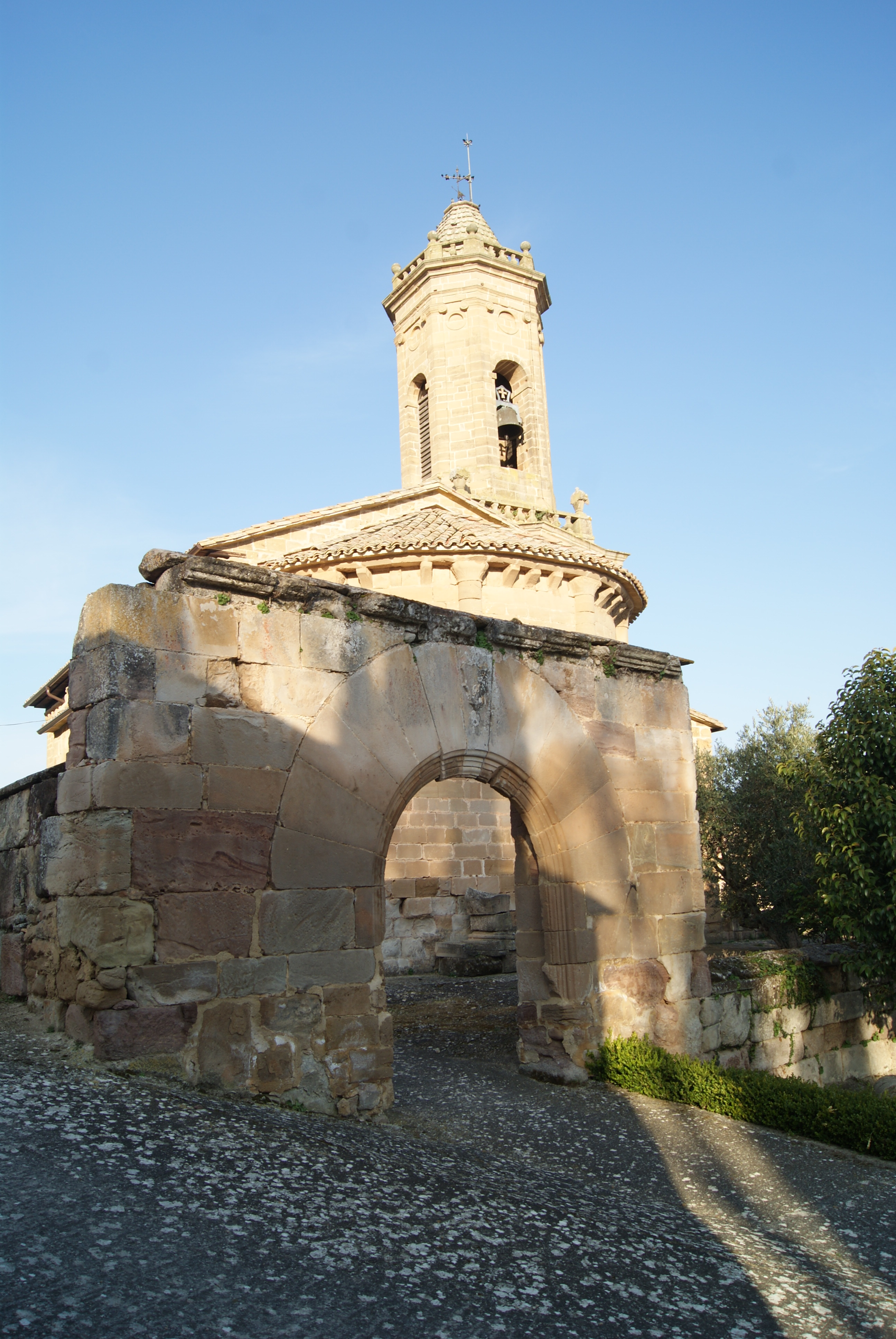 Olejua (Navarra)